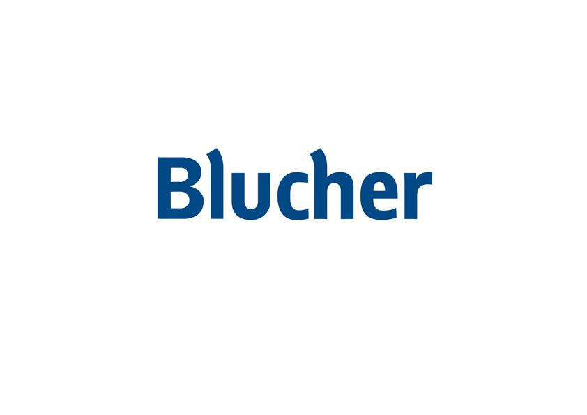 Logo da Editora Blucher, em branco e azul.